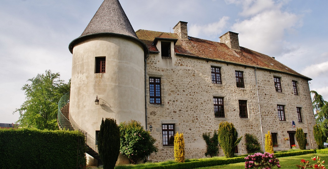 La Mairie, château de la Motte à Mérinchal.